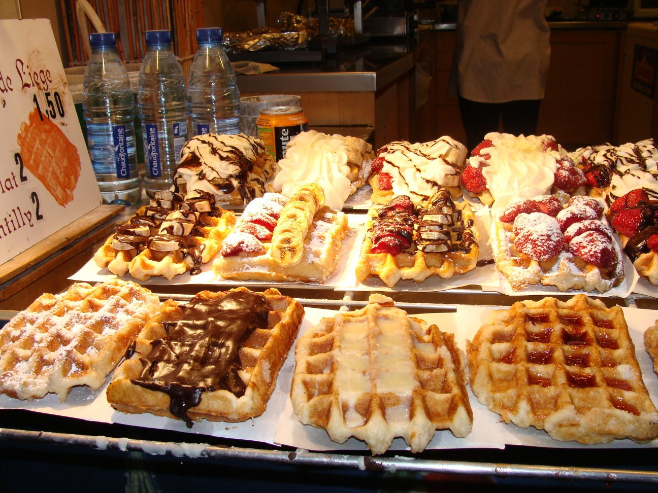 Gaufres